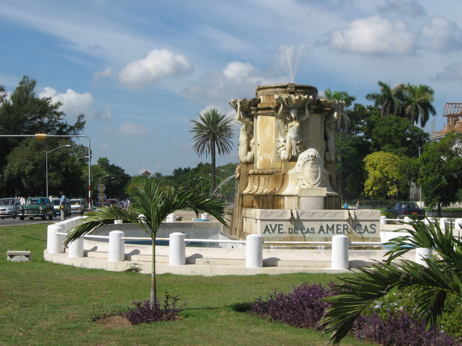 Inicio de la quinta avenida de La Habana